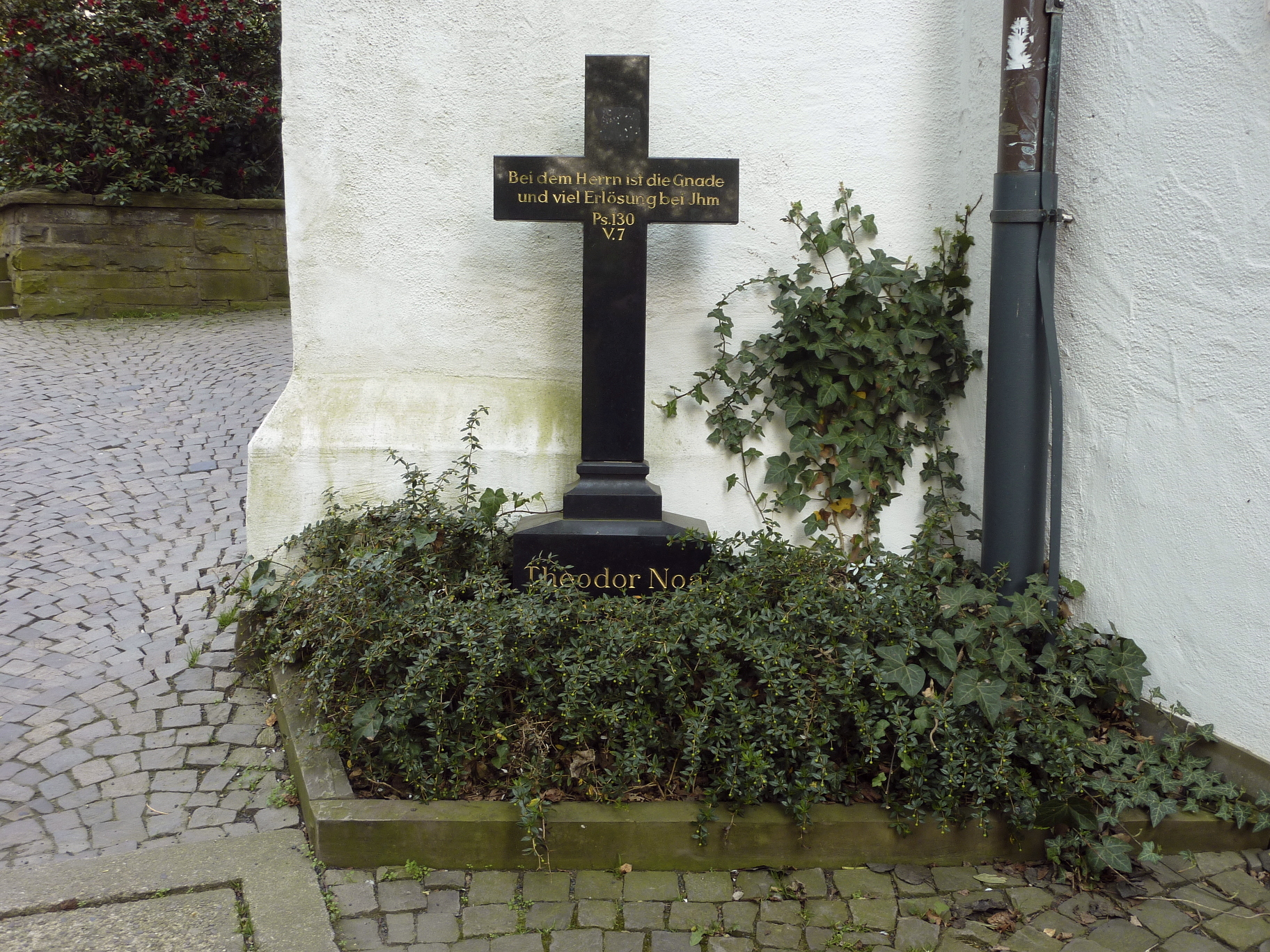 Stadt Siegen, Nordrhein-Westfalen: Die evangelische Nikolaikirche, erbaut im 13. Jahrhundert, ist nach der Martinikirche der zweitälteste Kirchenbau der Stadt. Das Foto zeigt das Grabkreuz des früheren Pfarrers der Kirche, Theodor Noa (1891–1938), der in der Zeit des Nationalsozialismus unter ungeklärten Umständen in Berlin ums Leben kam. Das Grabkreuz wurde Jahre später zu seinem Gedenken an eine nördliche Mauer der Nikolaikirche versetzt.